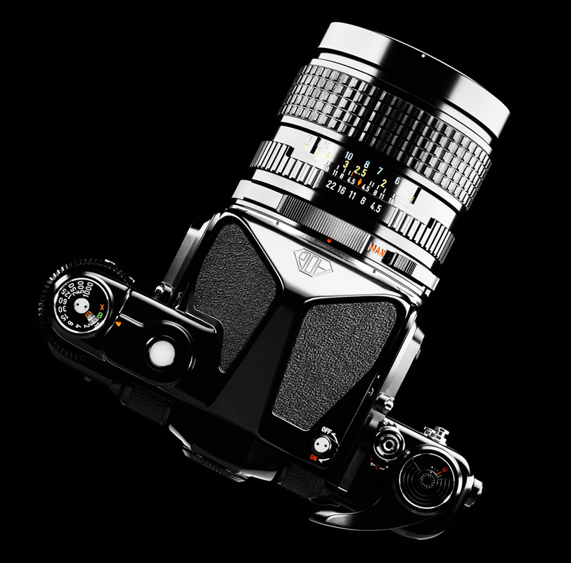 Pentax 6x7 Camera